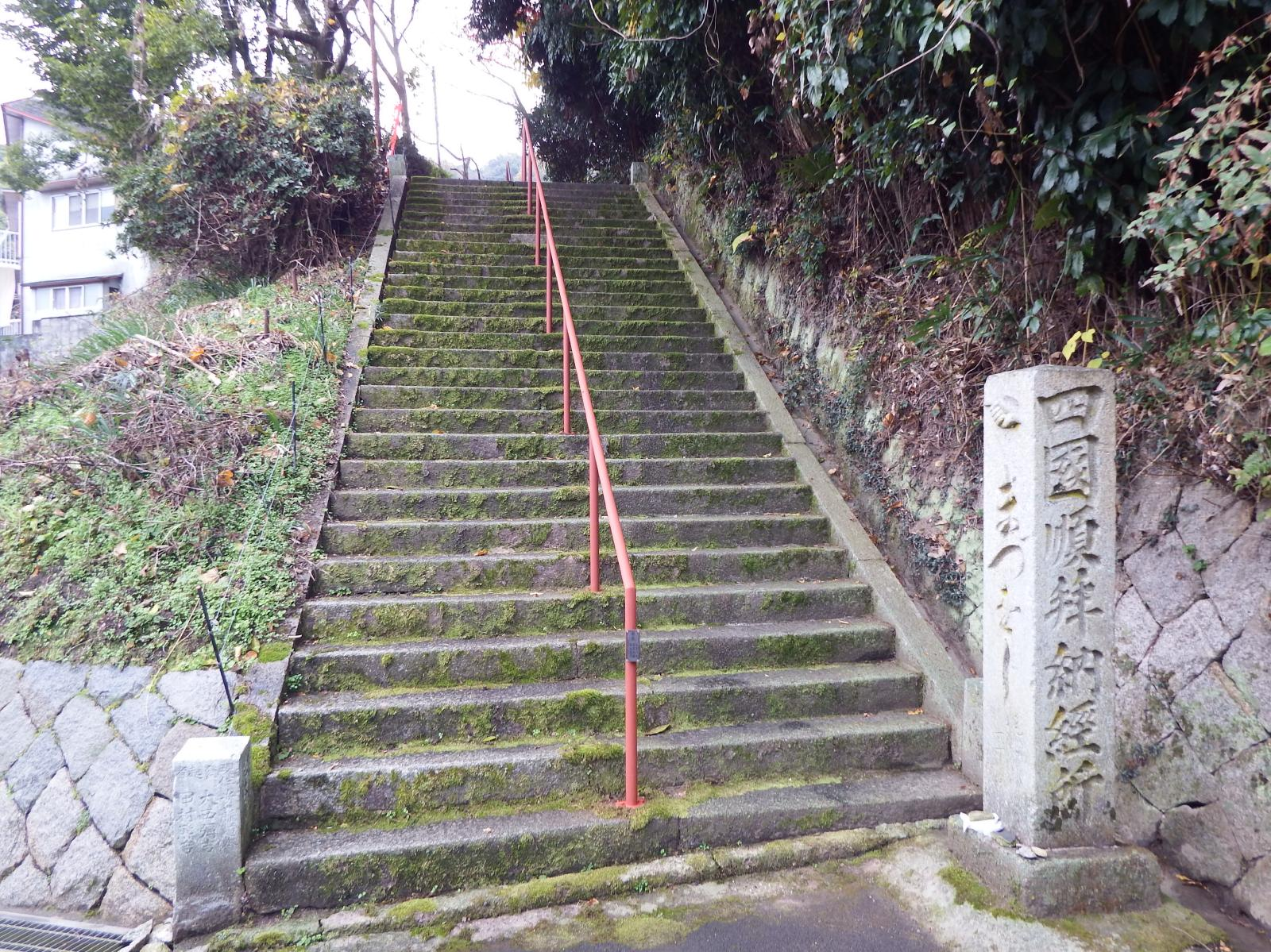 松尾寺の入口